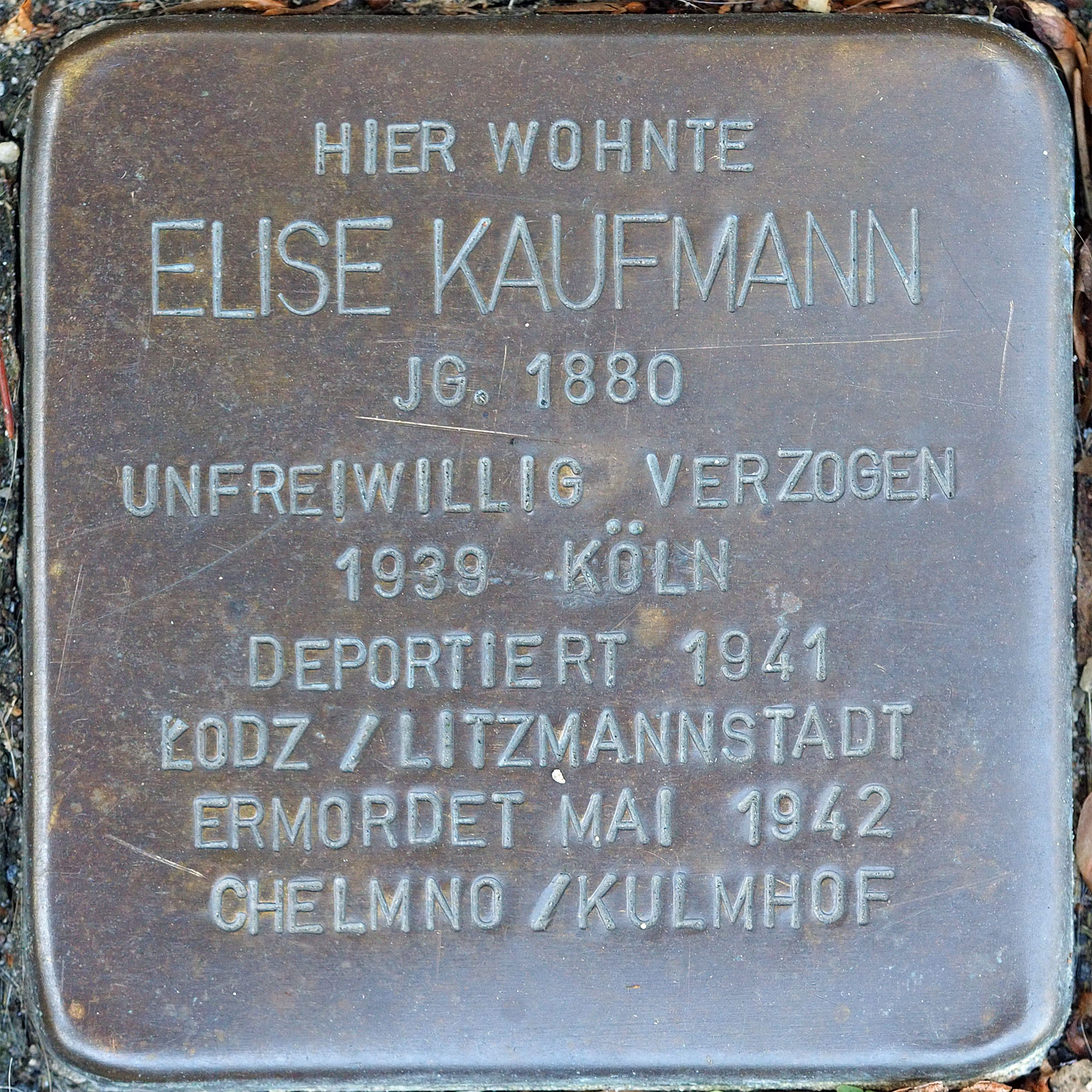 Stolpersteine GV: Kaufmann, Elise